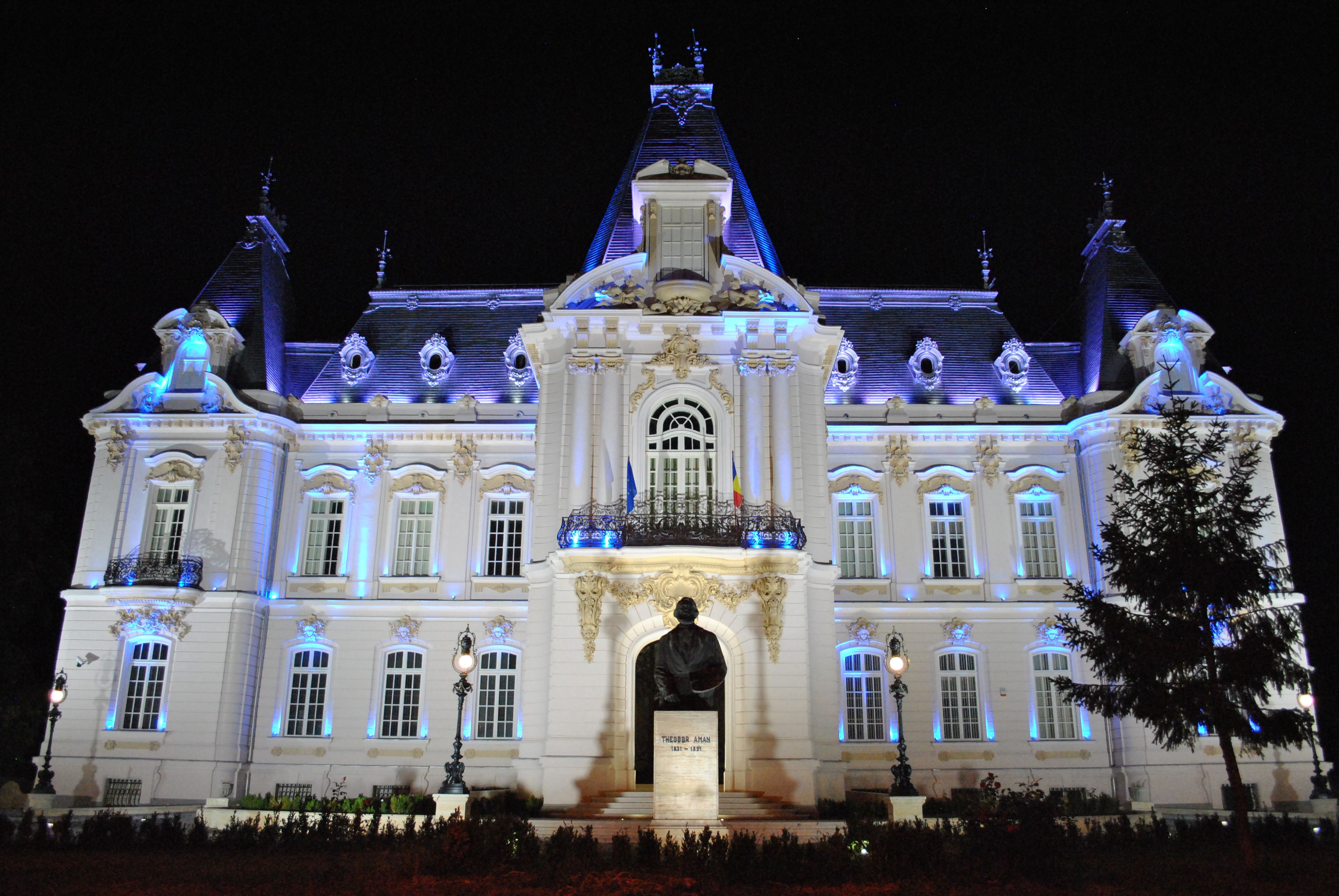 Vedere nocturna asupra Palatului Jean Mihail din Craiova